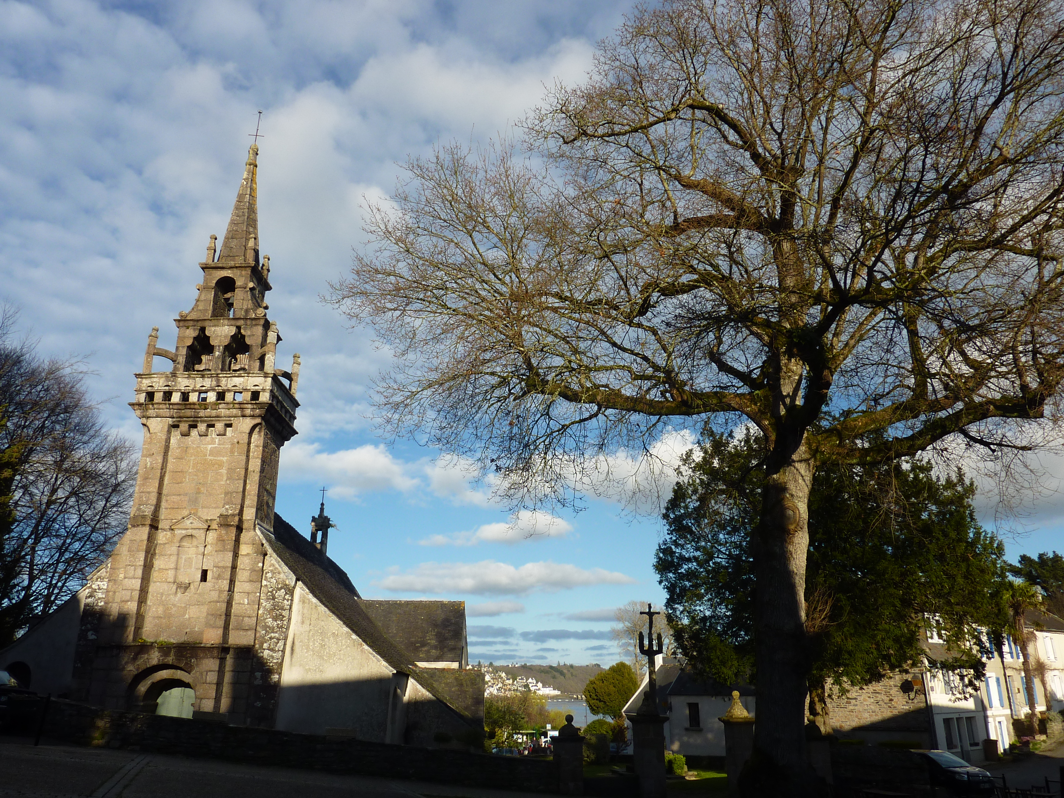 Locquénolé : l'Arbre de la Liberté et l'église paroissiale Saint-Guénolé